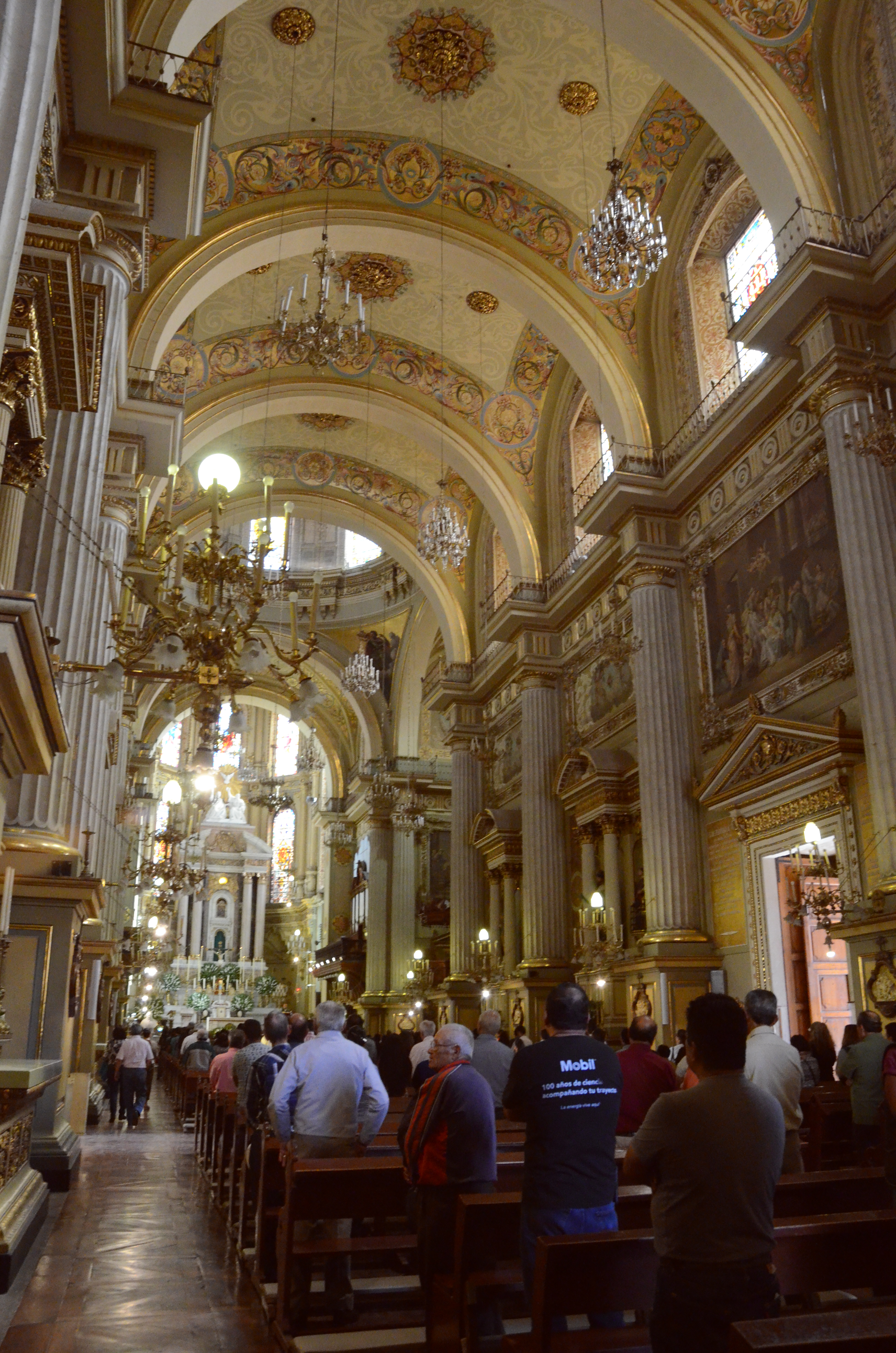 Catedral Nuestra Señora de la Luz